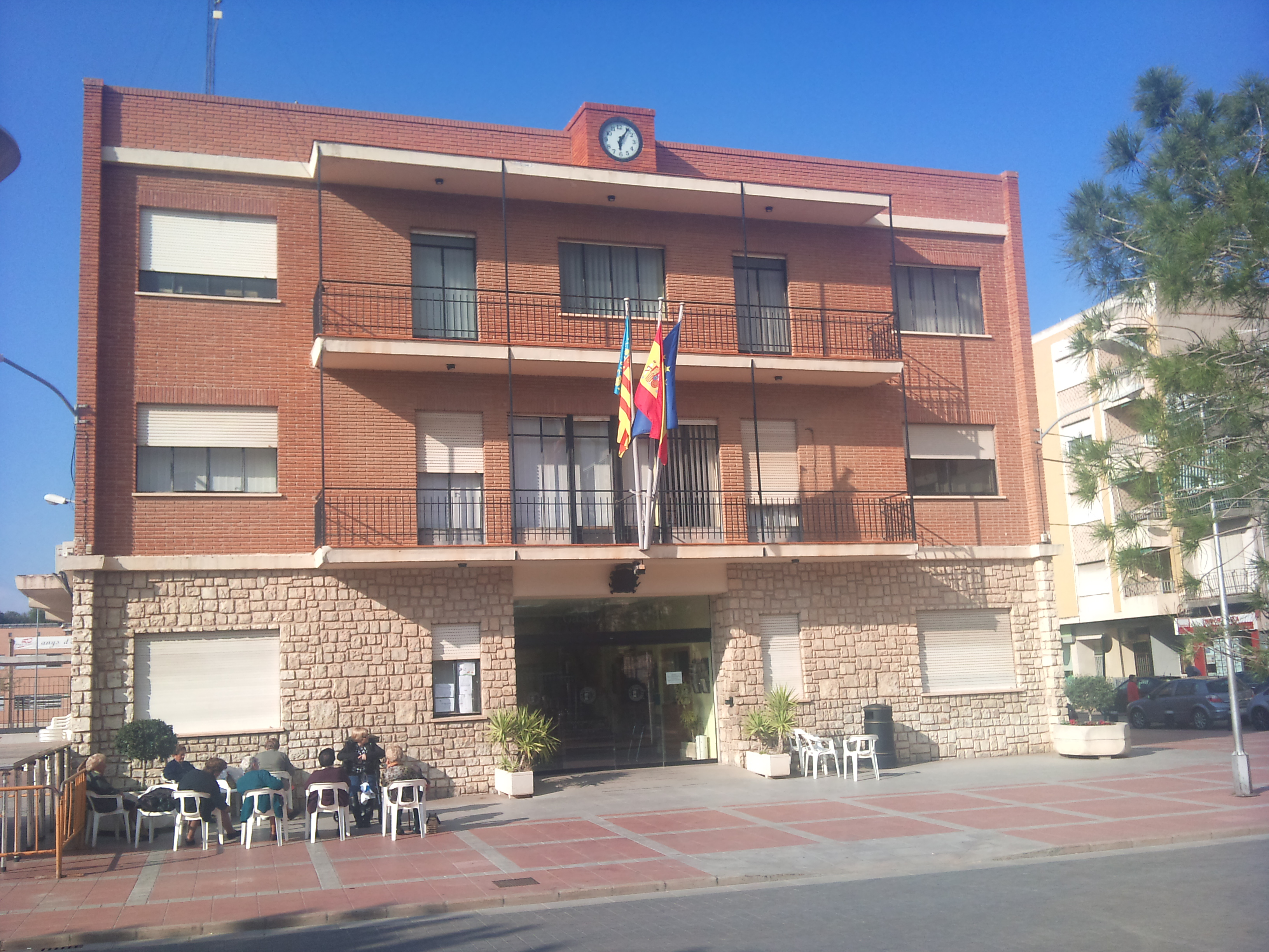 L'Ajuntament d'Almussafes